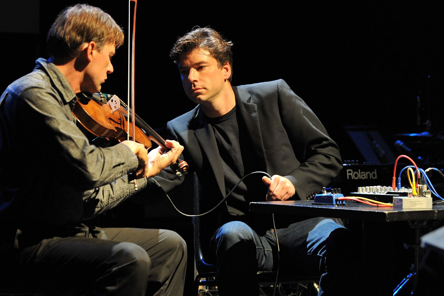 Mathis Nitschke mit Klaus-Peter Werani (Bratsche) bei einer Improvisation während der Verleihung des Musikstipendiums der Landeshaupstadt München 2010.